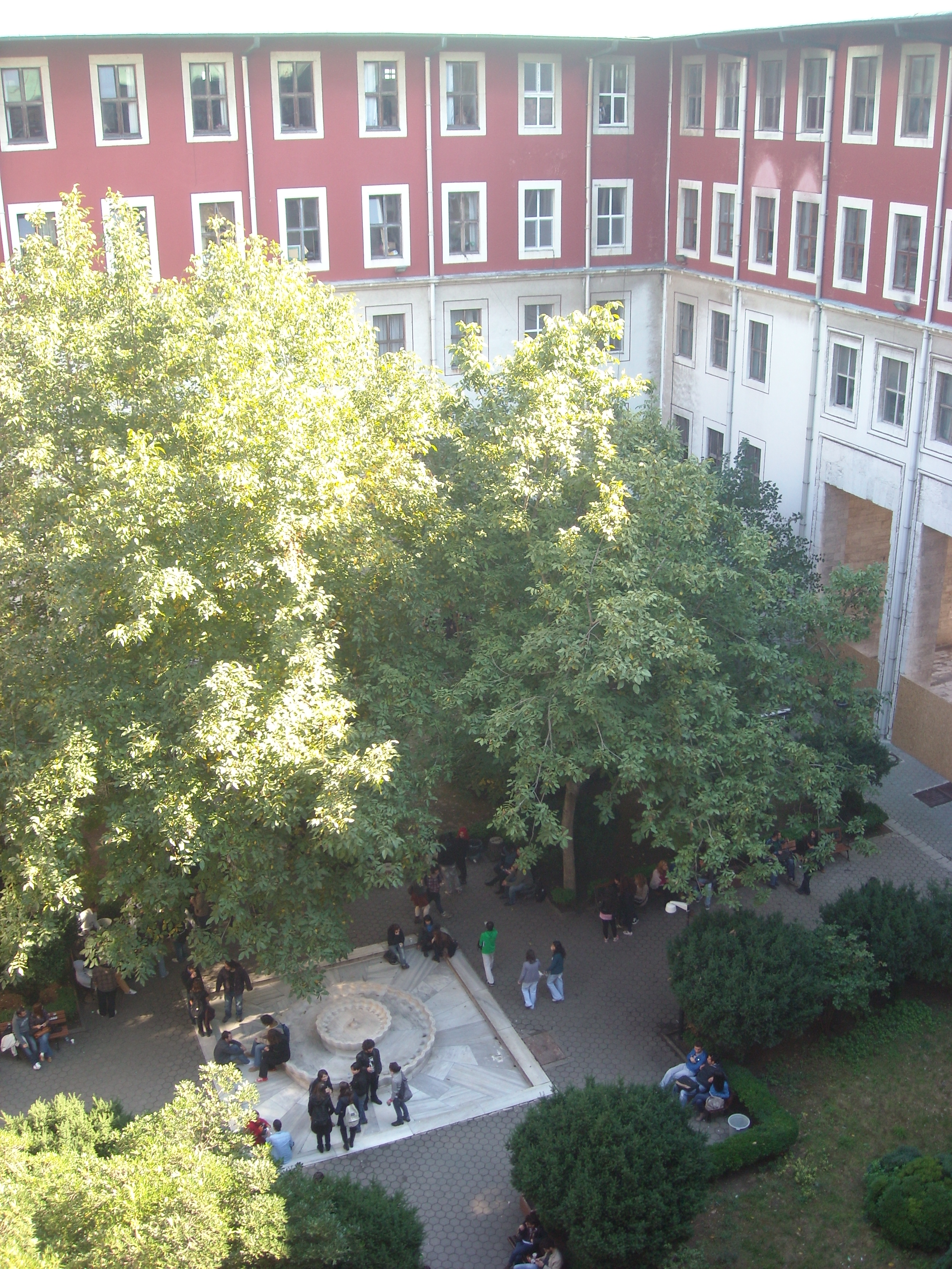 İstanbul Üniversitesi Edebiyat Fakültesi. Laleli.